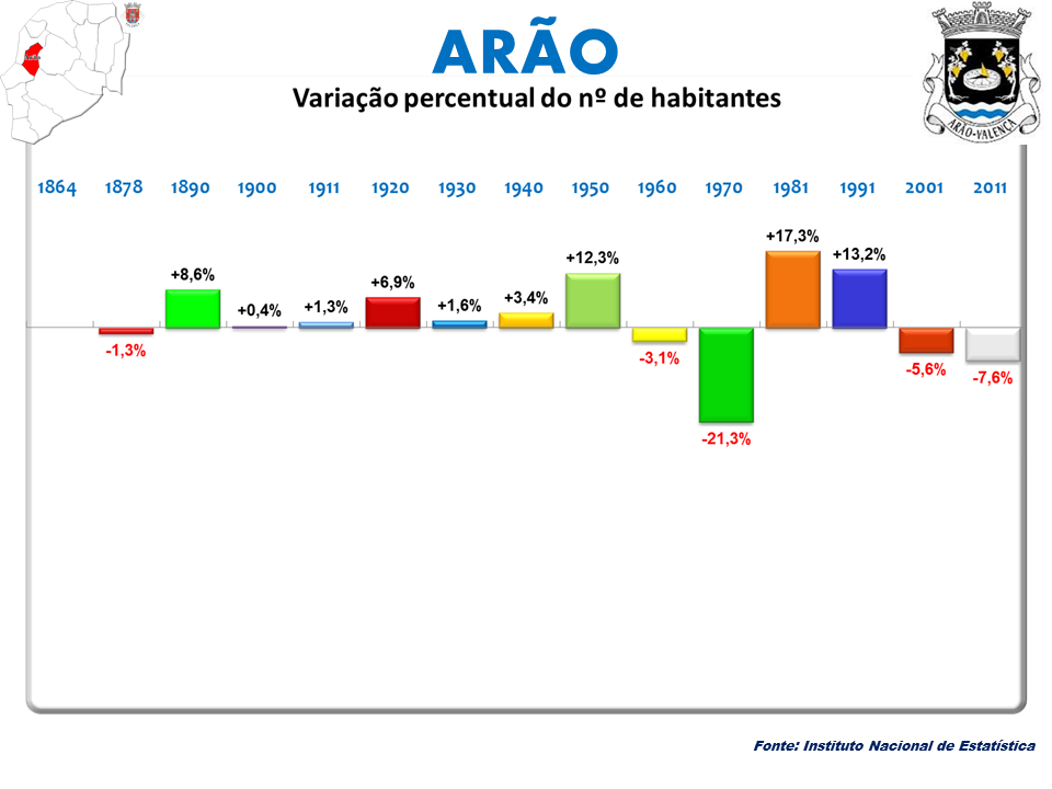 Censos 1864/2011